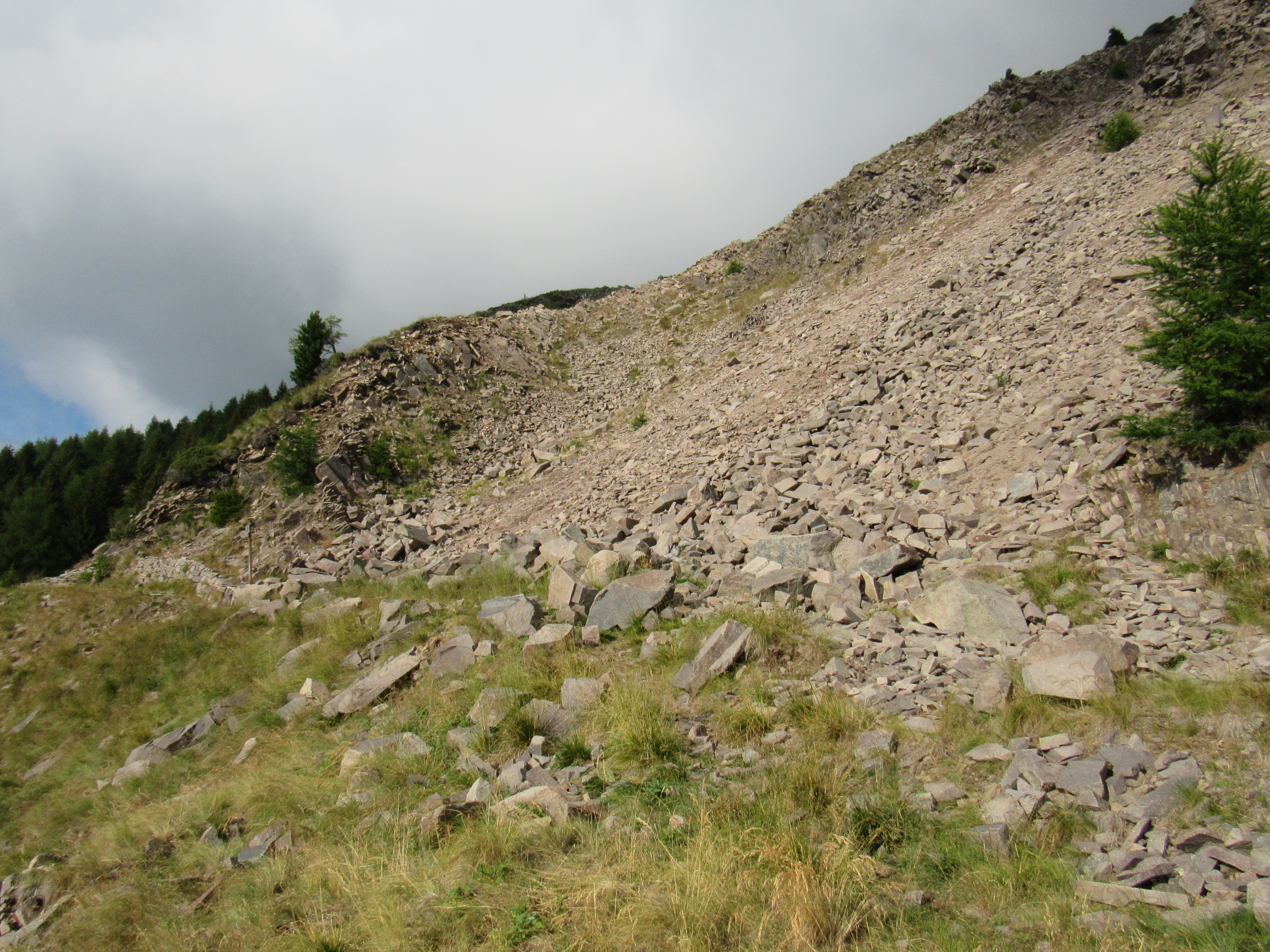 Dosso di Costalta (1955 m), Lagorai.